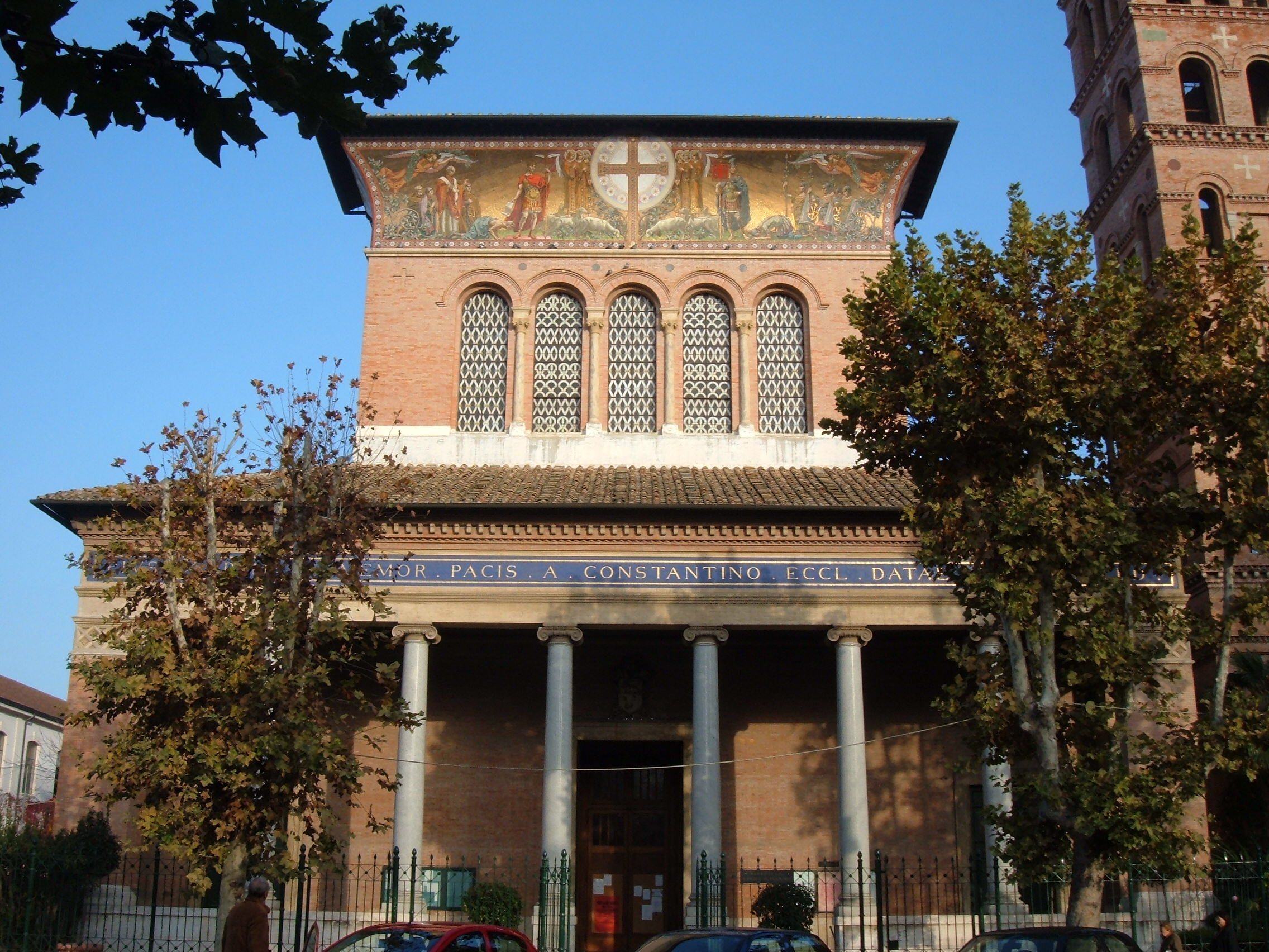 Basilica di Santa Croce a Via FLaminia, a Roma, nel quartiere Flaminio.